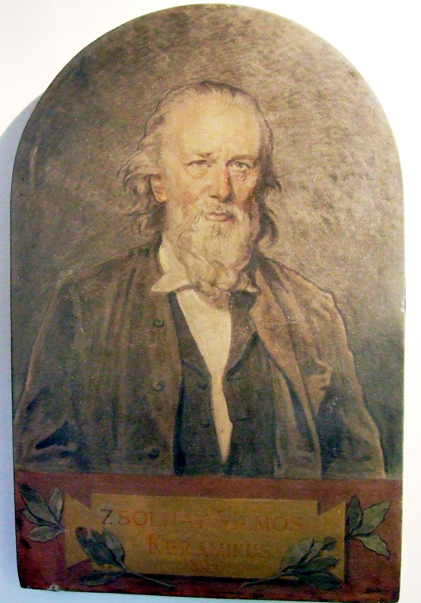 Zsolnay Vilmos portréja. Székely Bertalan festménye (1894). Zsolnay Múzeum, Pécs